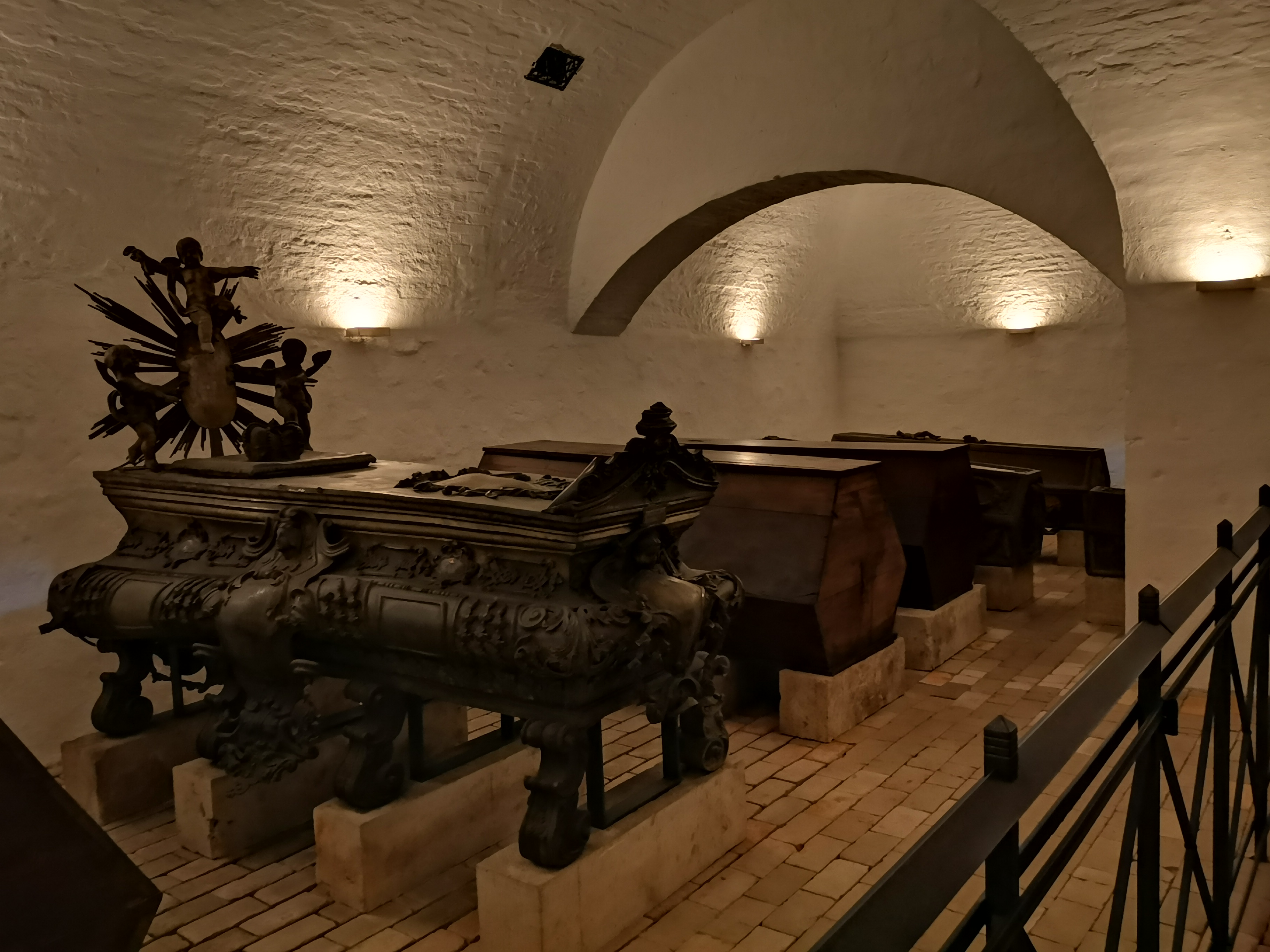 Fürstengruft Weimar; Särge von Herzogin Eleonora Wilhelmina (1696–1726), Herzog Wilhelm Ernst (1662–1728), Herzogin Anna Dorothea (1657–1704), Herzogin Sophia Augusta (1663–1694) und Herzog Johann Ernst III. (1664–1707) (von links nach rechts)